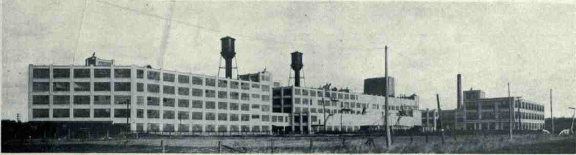 Kodak Mount Dennis campus, circa 1915.